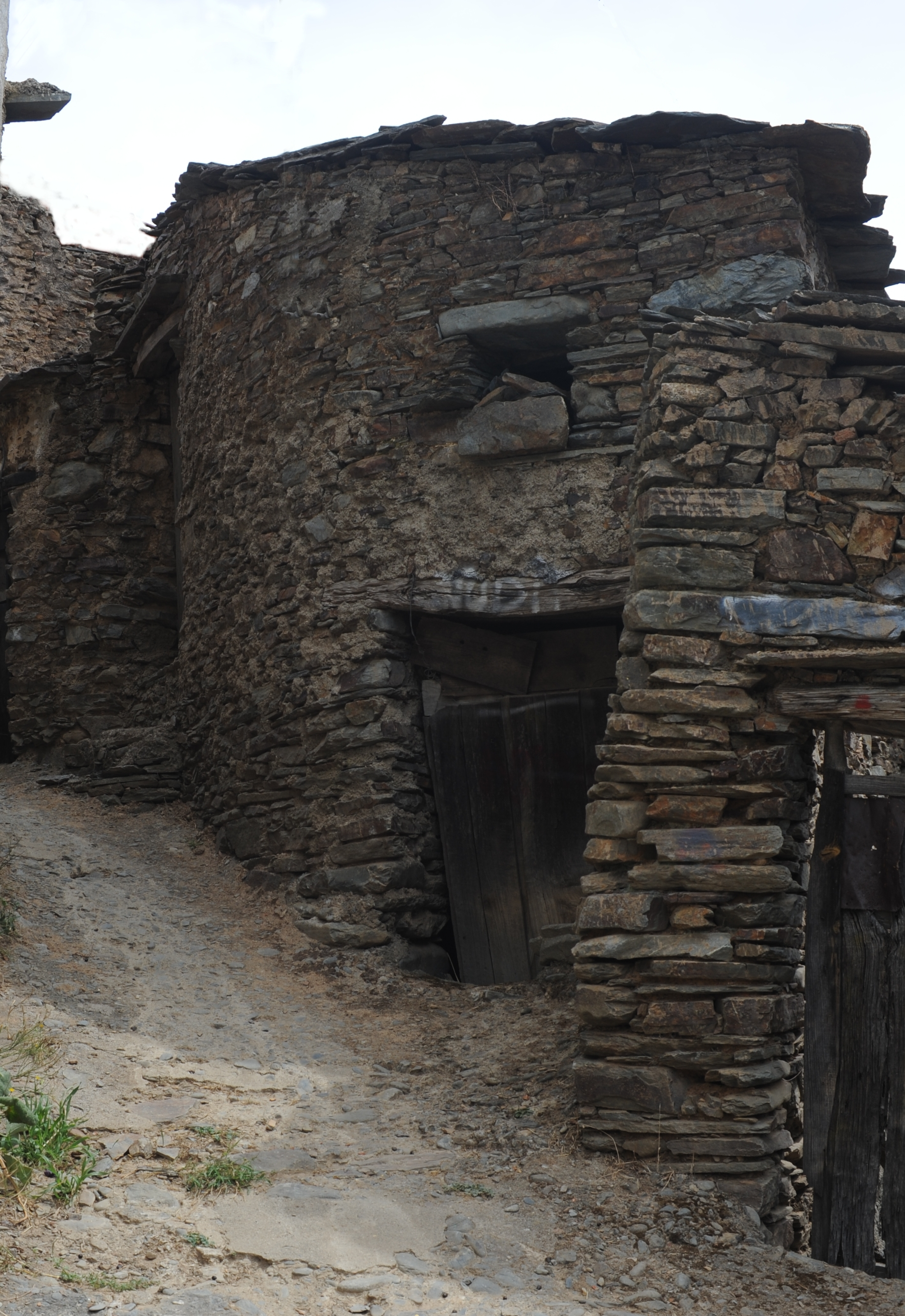 Arquitectura popular hurdana de Aceitunilla (Cáceres)